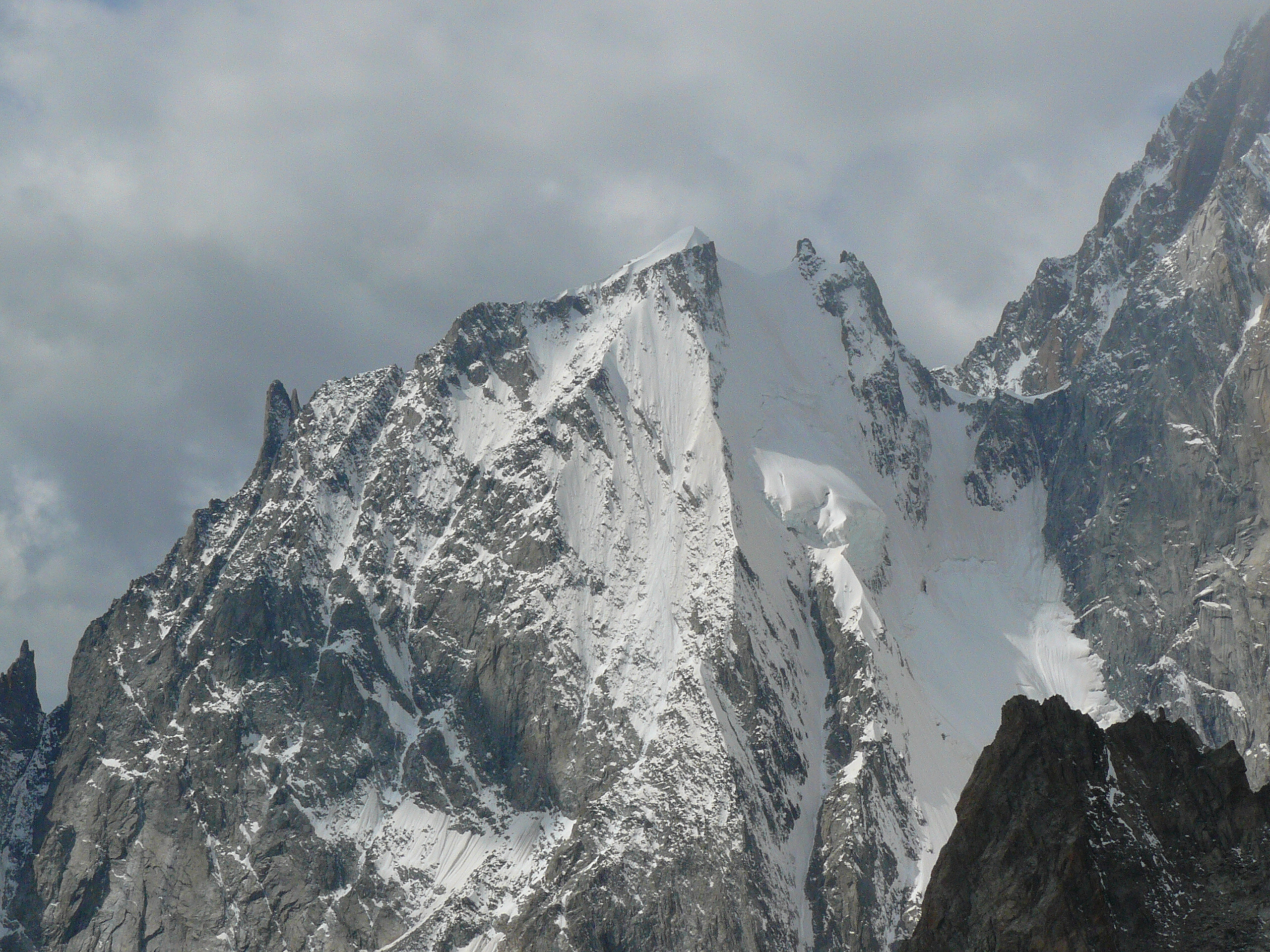 Blanche de Peuterey depuis la Pointe Helbronner